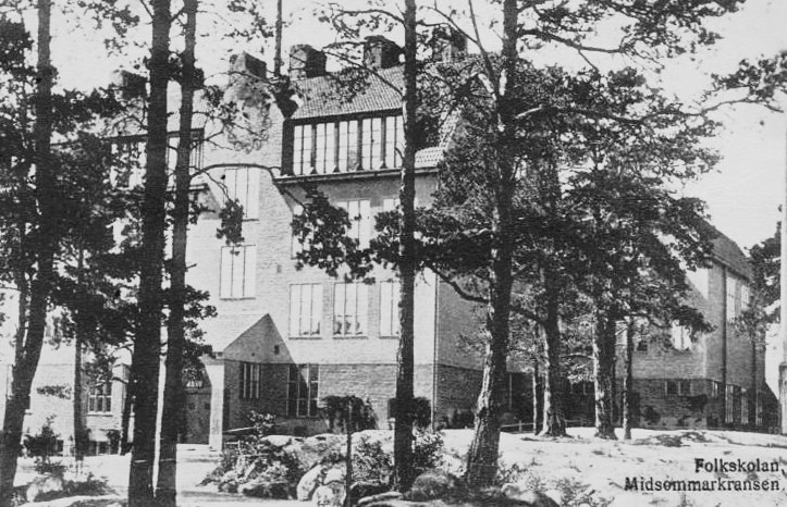 Midsommarkransens skola ca 1915, före tillbyggnaden